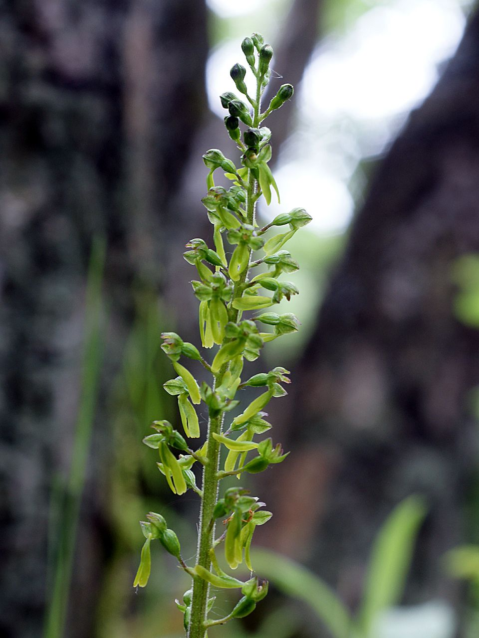 Neottia ovata